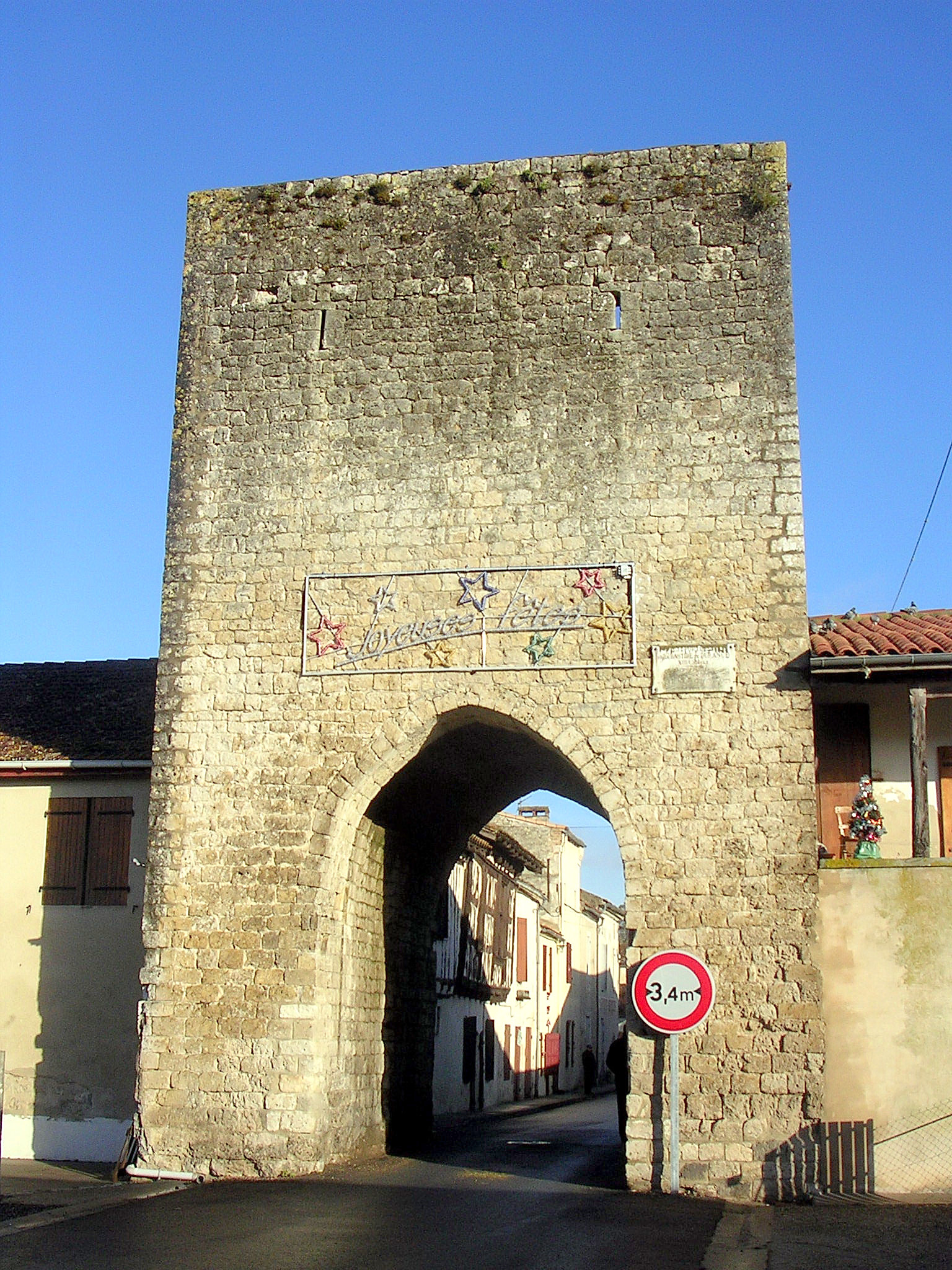 Porte de la bastide de Durance (Lot-et-Garonne, France)